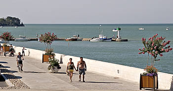 Front de mer sur le port - Rivedoux-Plage - Île de Ré - France Photo issue de ma banque d'images personnelle